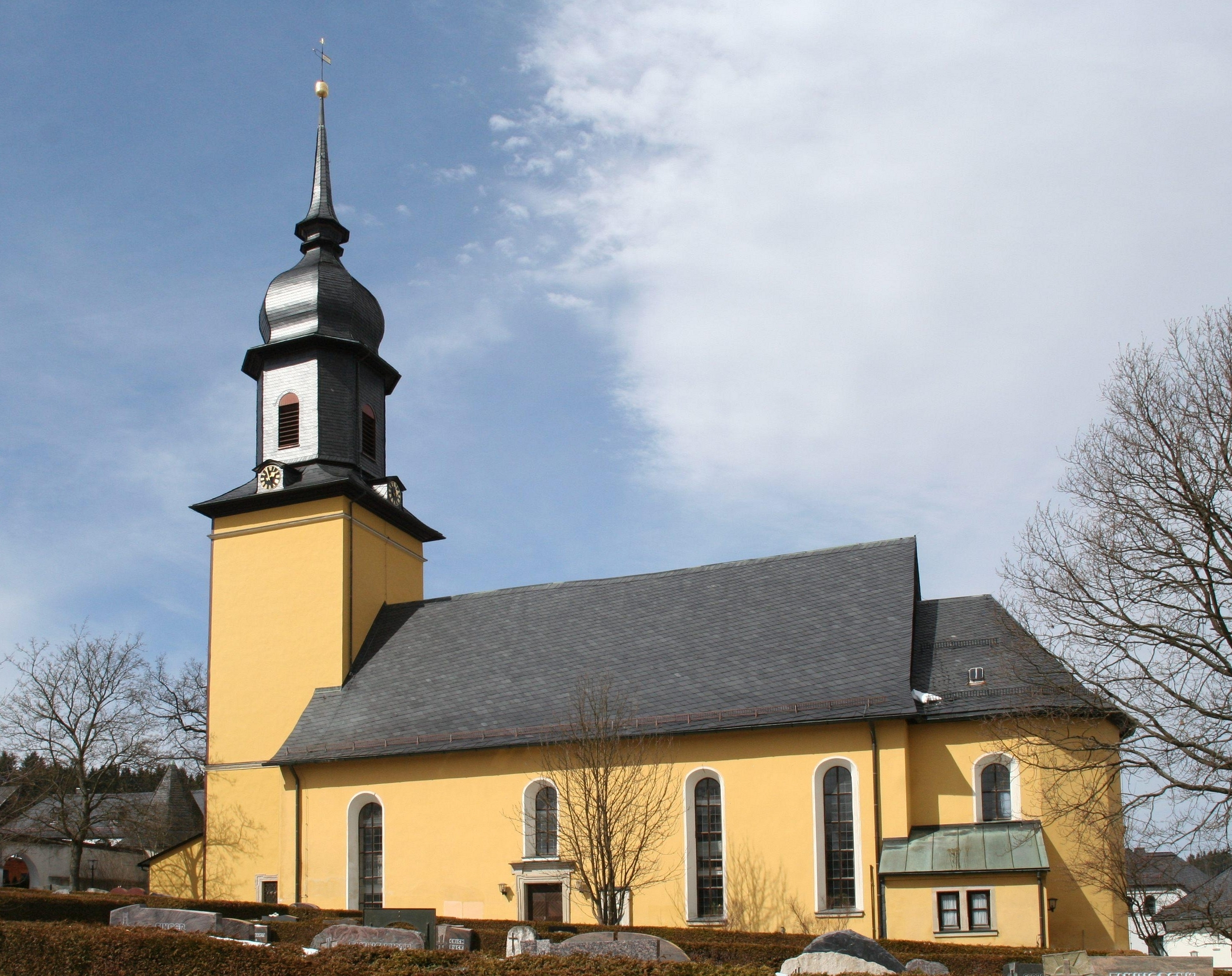 Bildbeschreibung: Geroldsgrün im Landkreis Hof, evangelische Jakobuskirche *Quelle: selbst fotografiert Störfix *Datum: 30. März 2008 ==